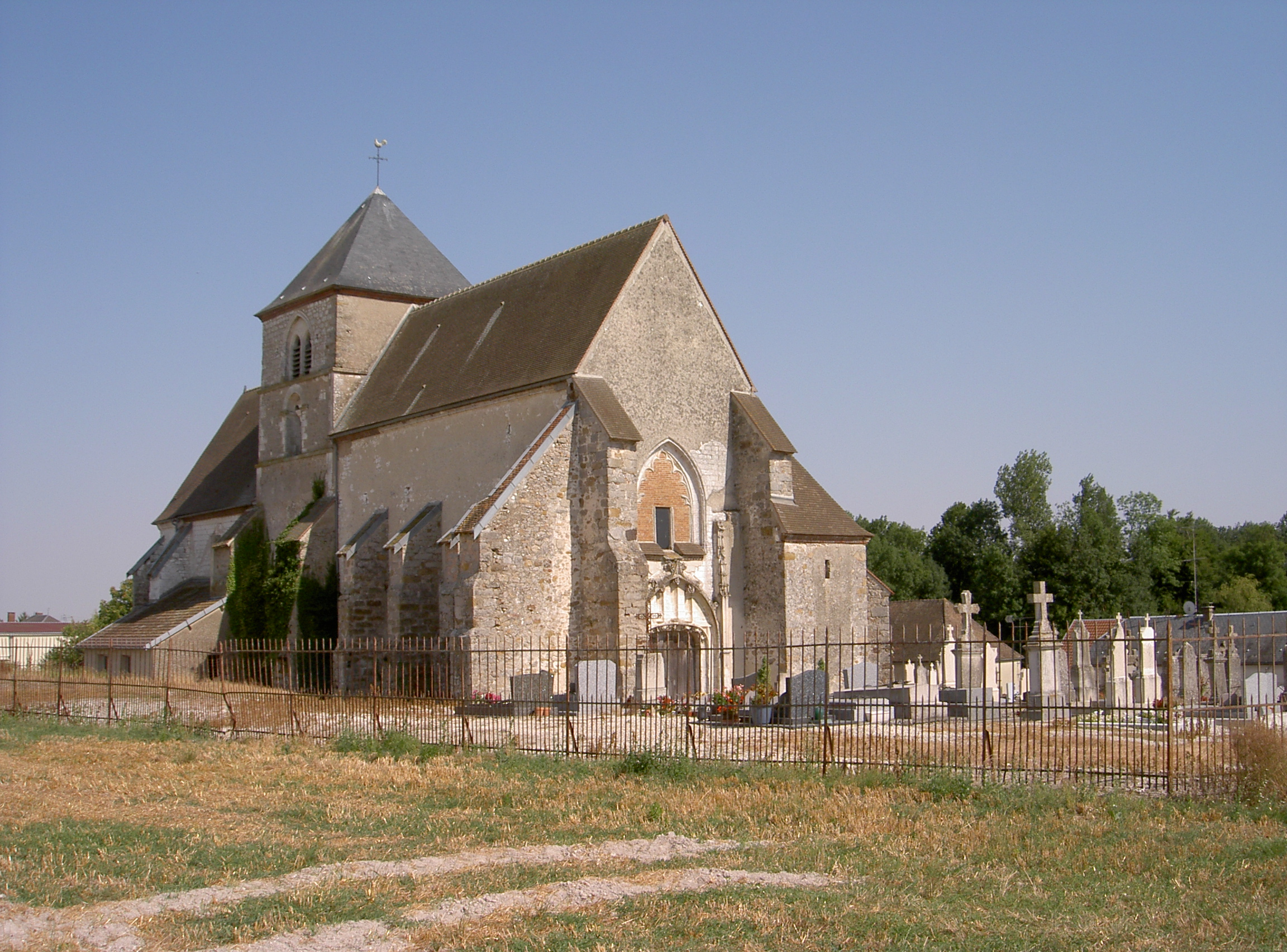 Eglise de saint lupien